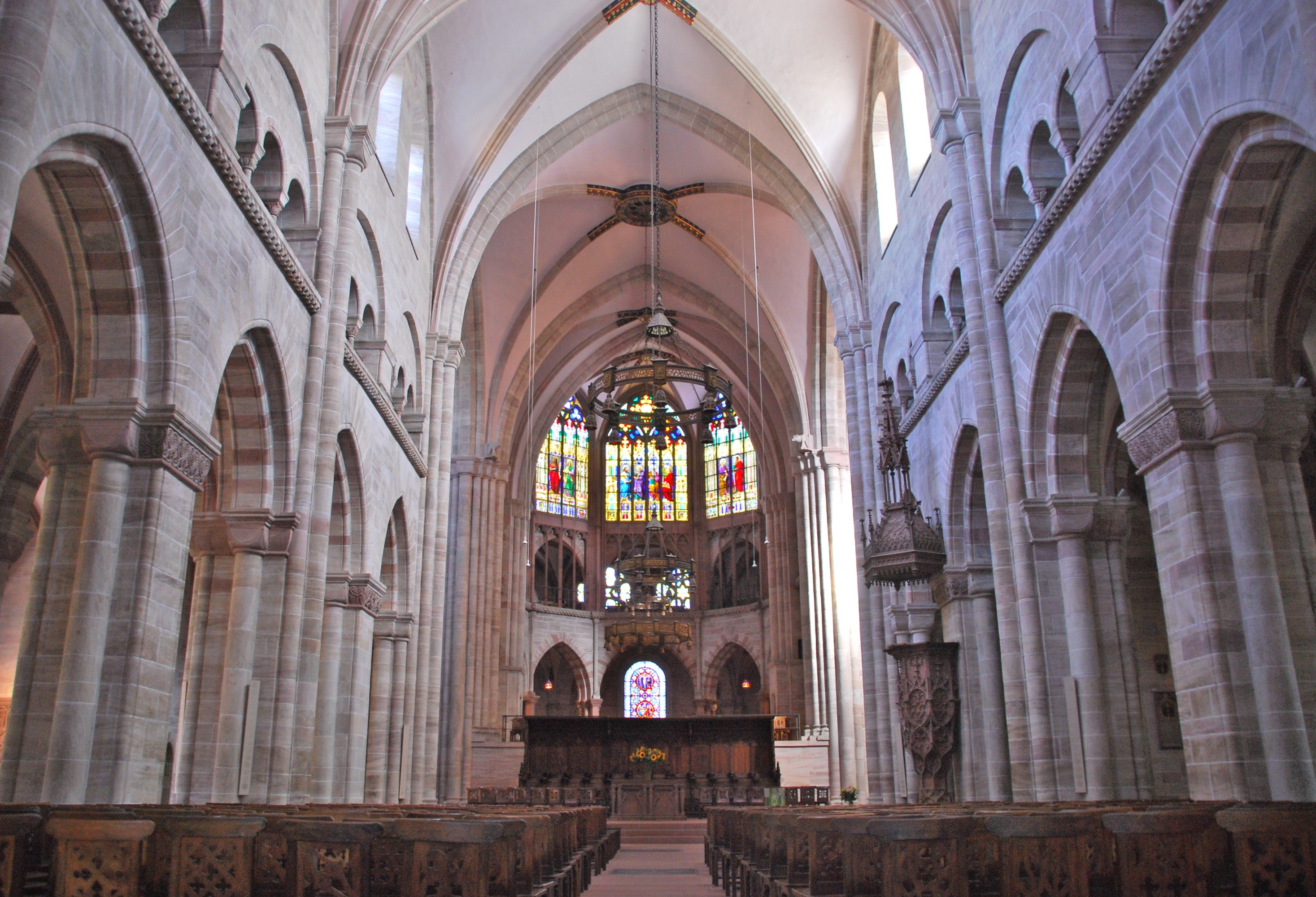 Basel Münster, interior